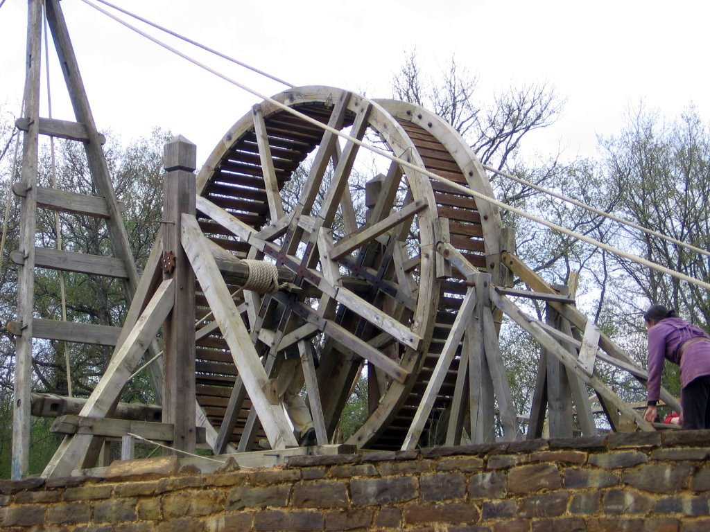 Une cage à écureuils au chantier médiéval de Guédelon.